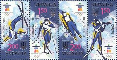 Марки України «XXI зимові Олімпійські ігри. Ванкувер-2010»